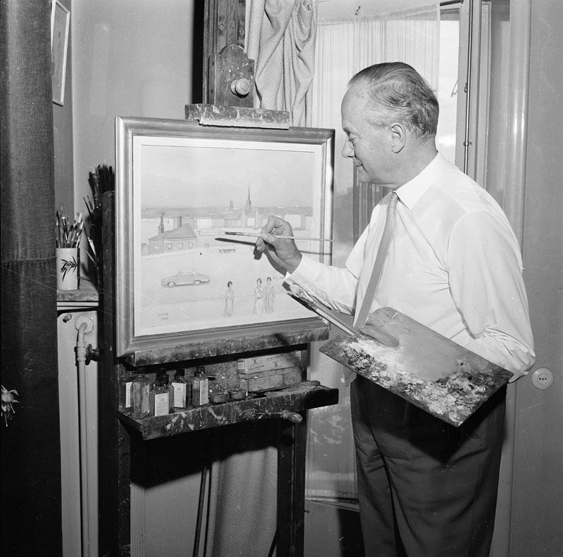 Stagneliusvägen 34. Konstnären Einar Jolin i sin ateljé, som angränsade till bostaden